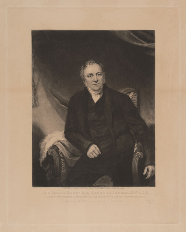 Herbert Jenner-Fust (1778-1852)